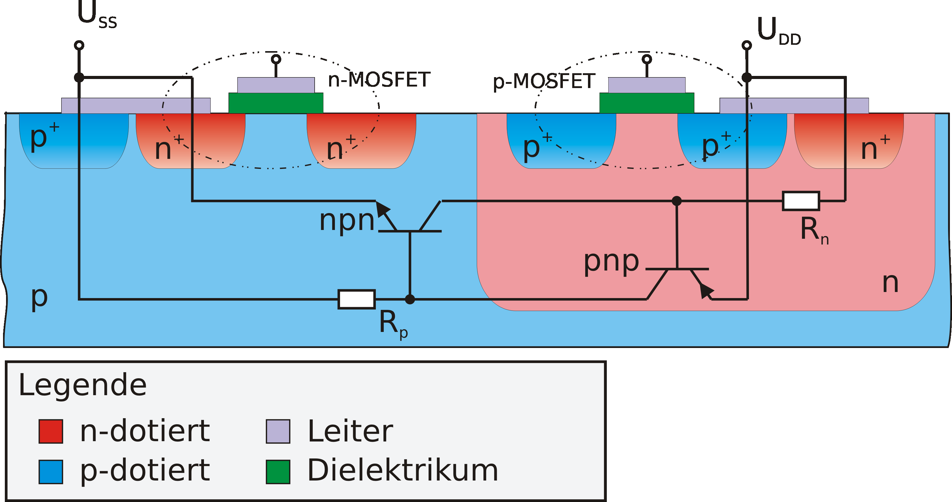 Die Grafik stellt Querschnitt durch einen CMOS-Inverter (nicht verdrahtet) dar. Überliegend ist die Schaltung eines äquvalenten, parasitären Thyristor dargestellt, welcher beim Latch-Up-Effekt zündet.